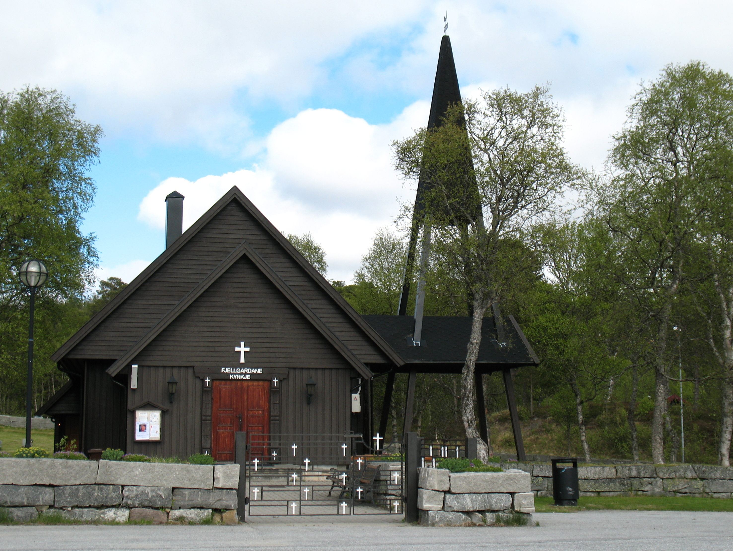 Fjellgardane kyrkje, vigsla som Hovden kapell i 1957, på Hovden i Bykle, Aust-Agder, er ei langkyrkje i tre.